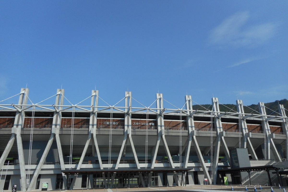 スタンド外観